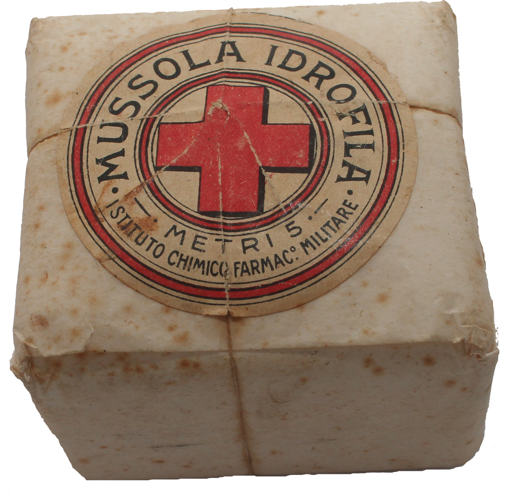 La mussola idrofila costituisce uno dei semplici ausili di primo soccorso forniti ai soldati durante la Grande Guerra. La confezione, morbida, costituita da un involucro di carta bianca (oggi punteggiata dalla muffa) e da un'etichetta che la identifica, è ad oggi intatta e sigillata. Contiene 5m di mussola.